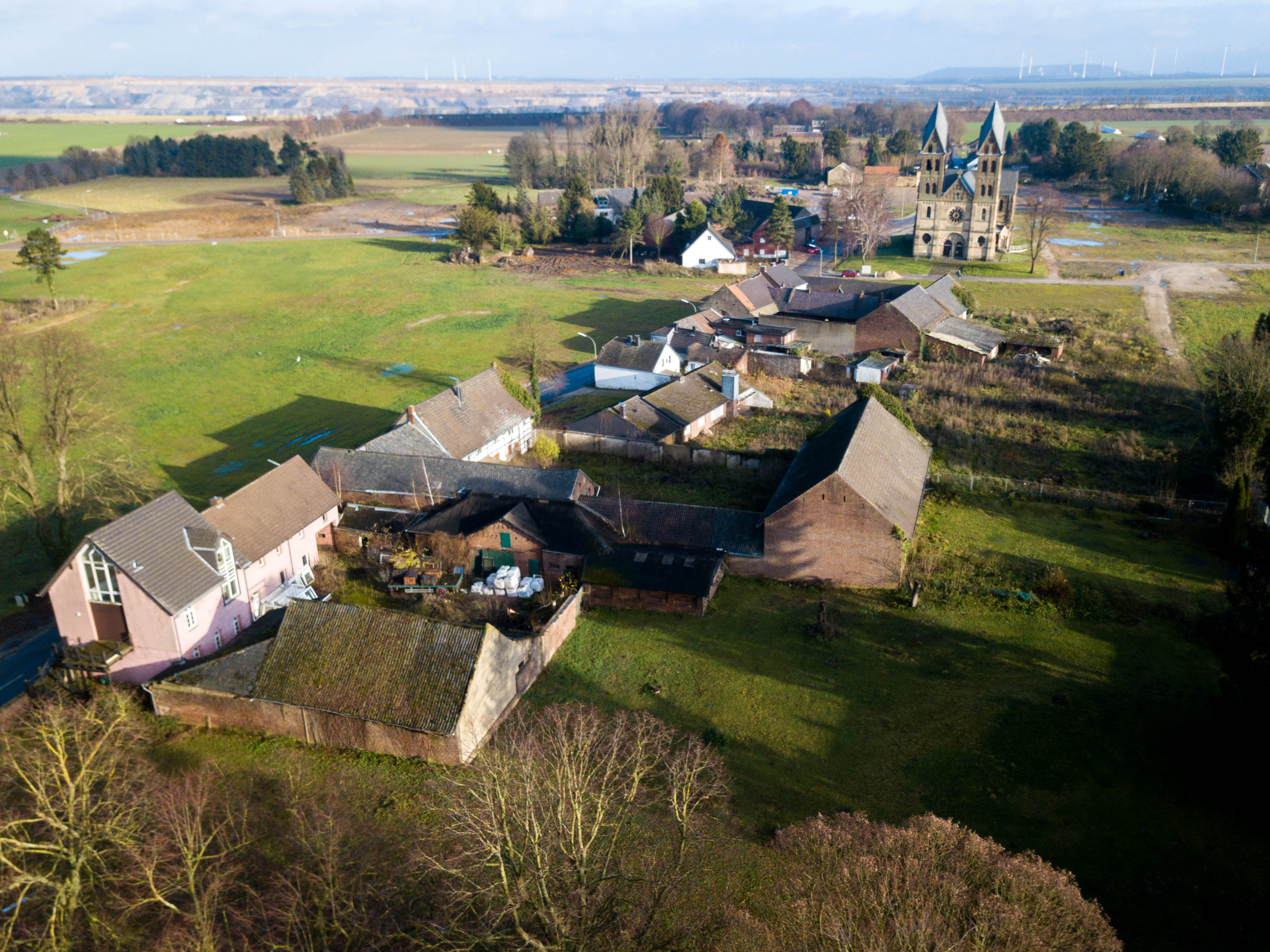 Wenige Monate bevor der Ort Immerath dem Braunkohletagebau von Garzweiler (Hintergrund) zum Opfer fällt, betrachtet die Fotodrohne den Ort mit seinem kleinen "Dom" aus westlicher Richtung.